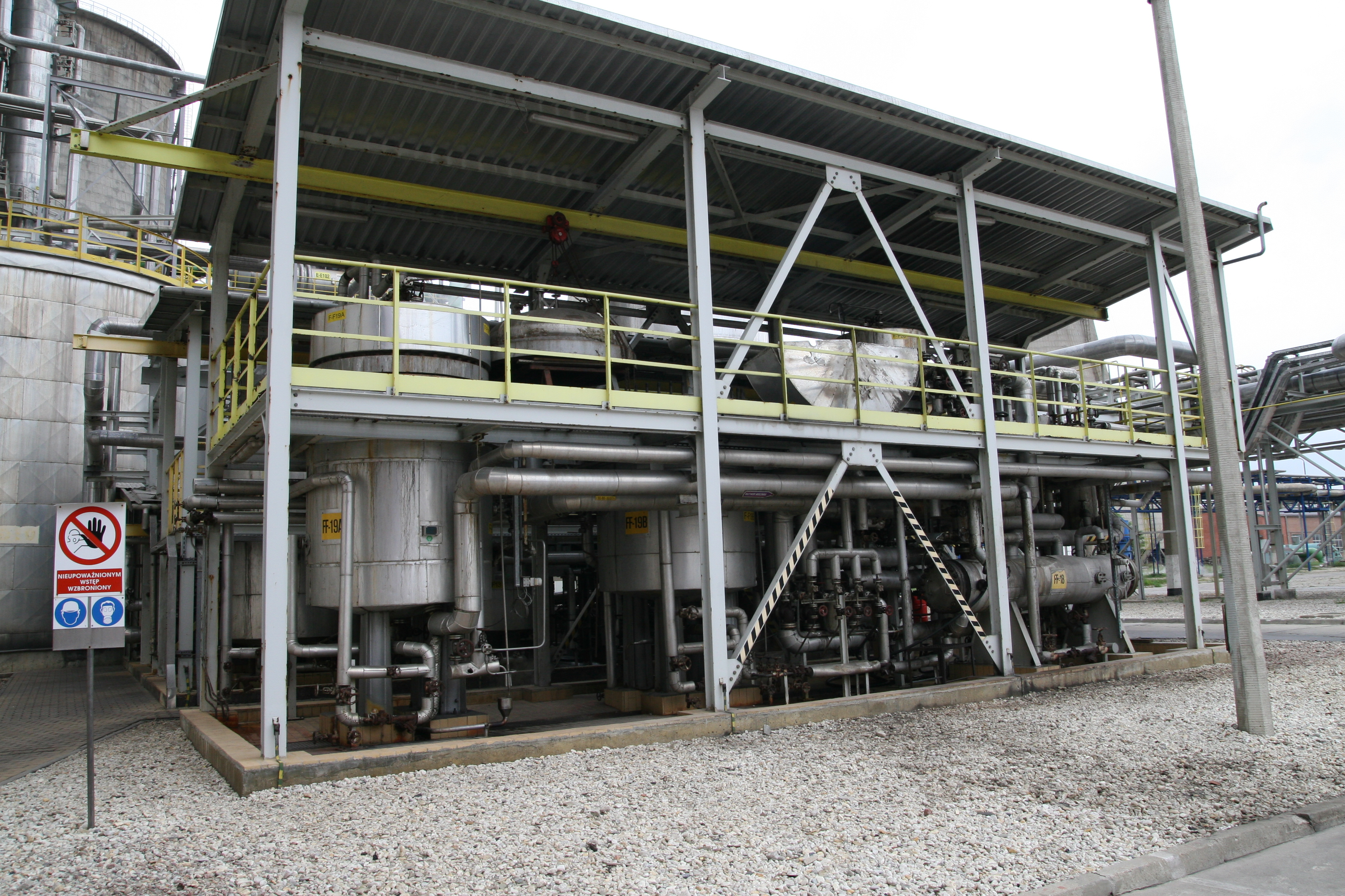 Instalacje produkcyjne w Grupie Azoty Zakładach Azotowych "Puławy" S.A.